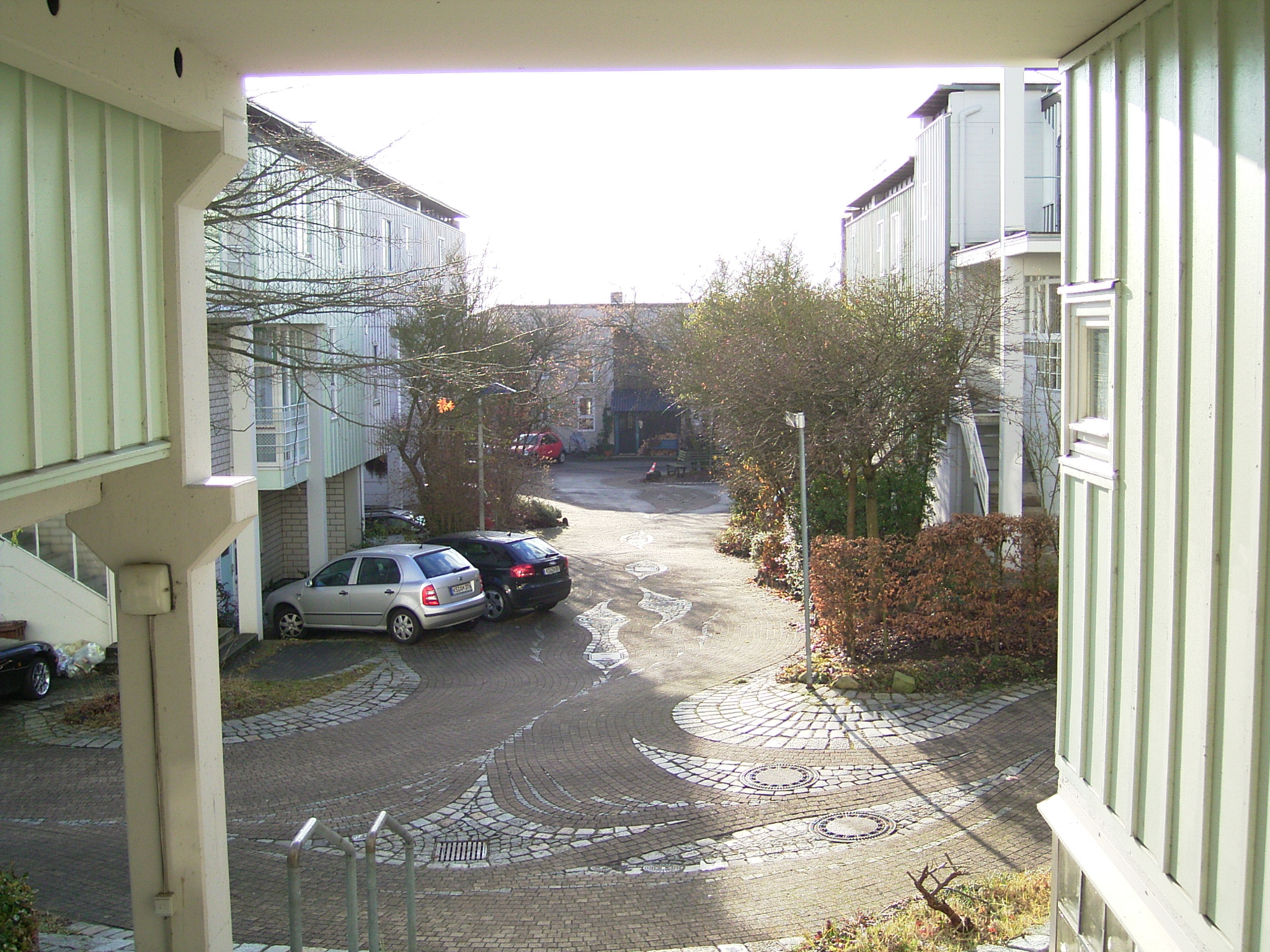 documenta urbana Wohngebäude in Kassel 1979-1982